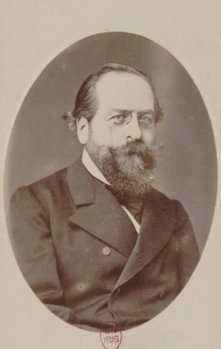 Eraïm Miriam Delaborde pianiste